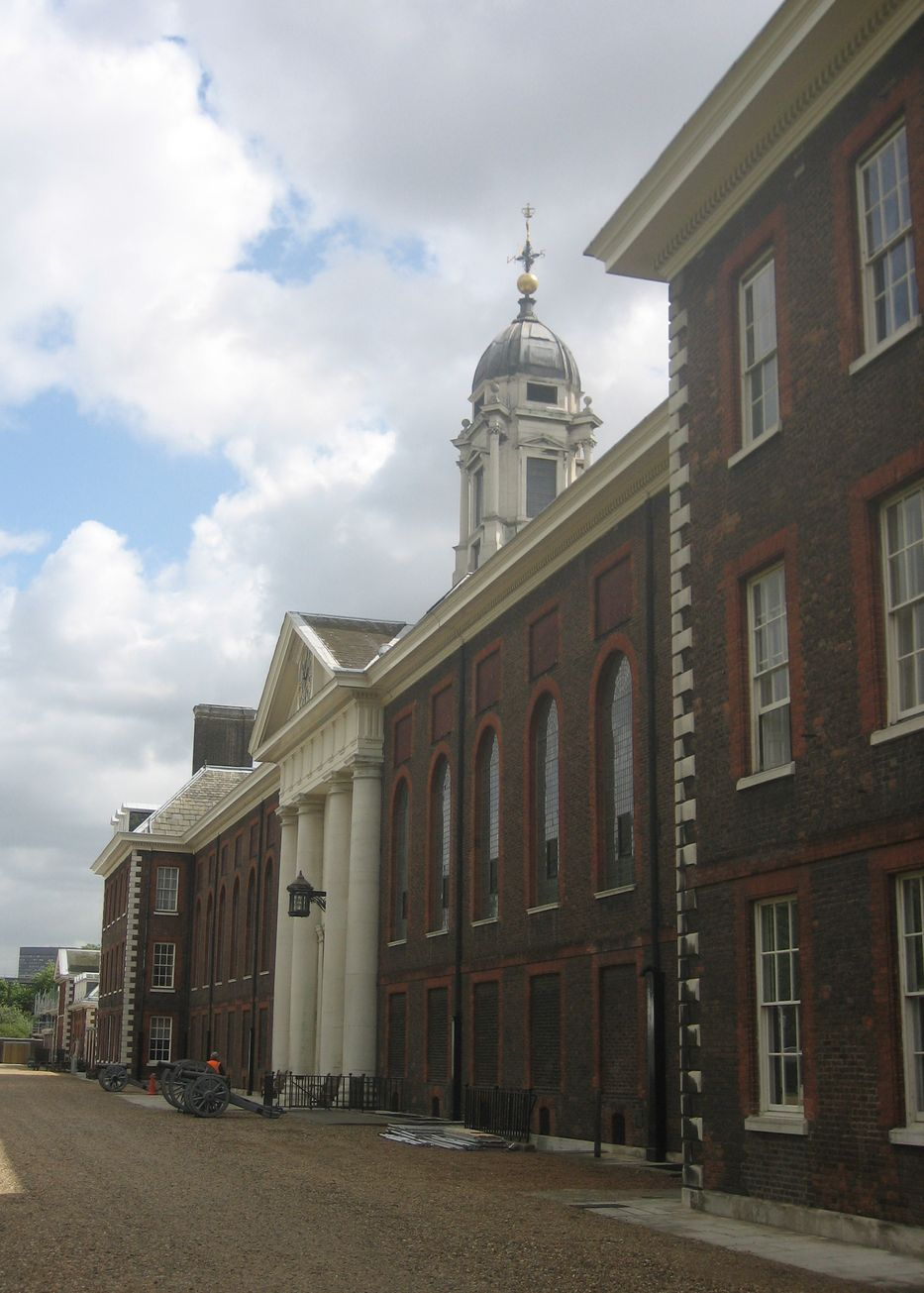 Hopital Royal de Chelsea - Chelsea Royal Hospital